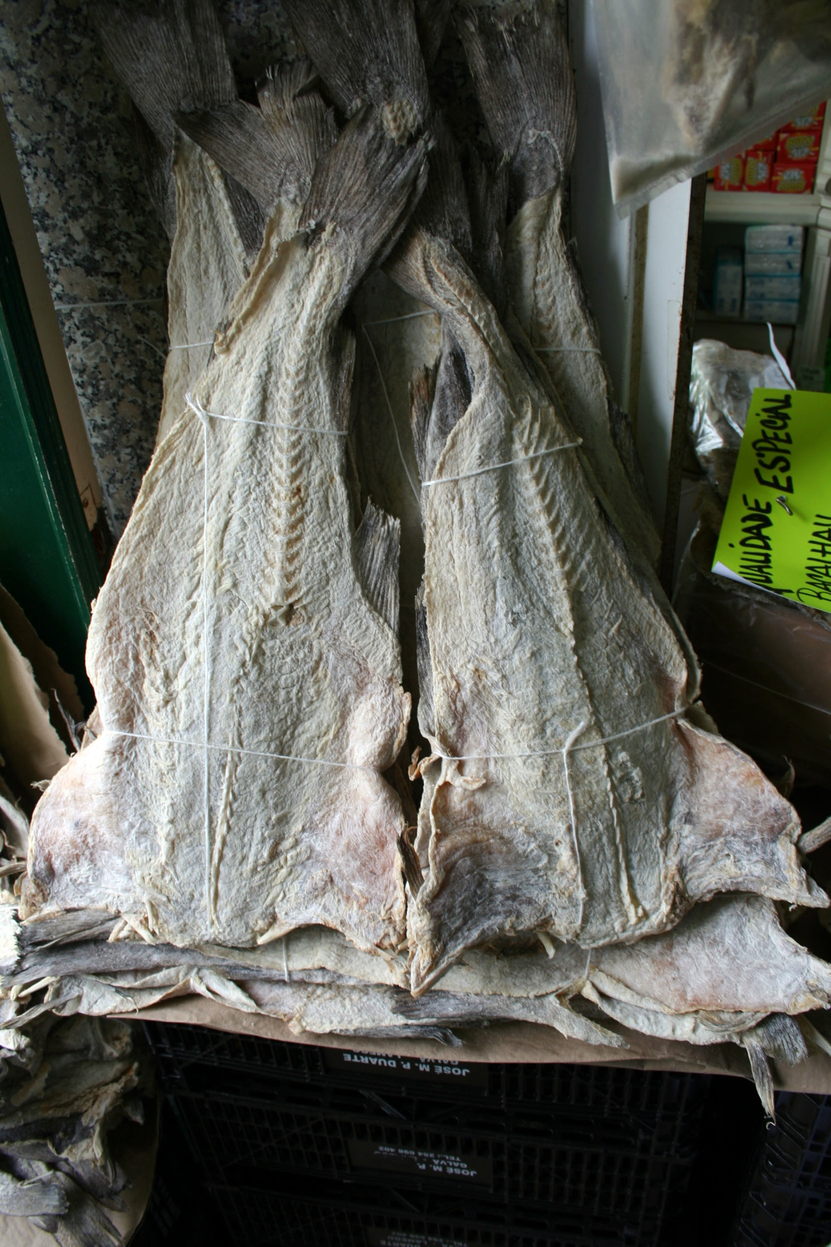 Bacalao